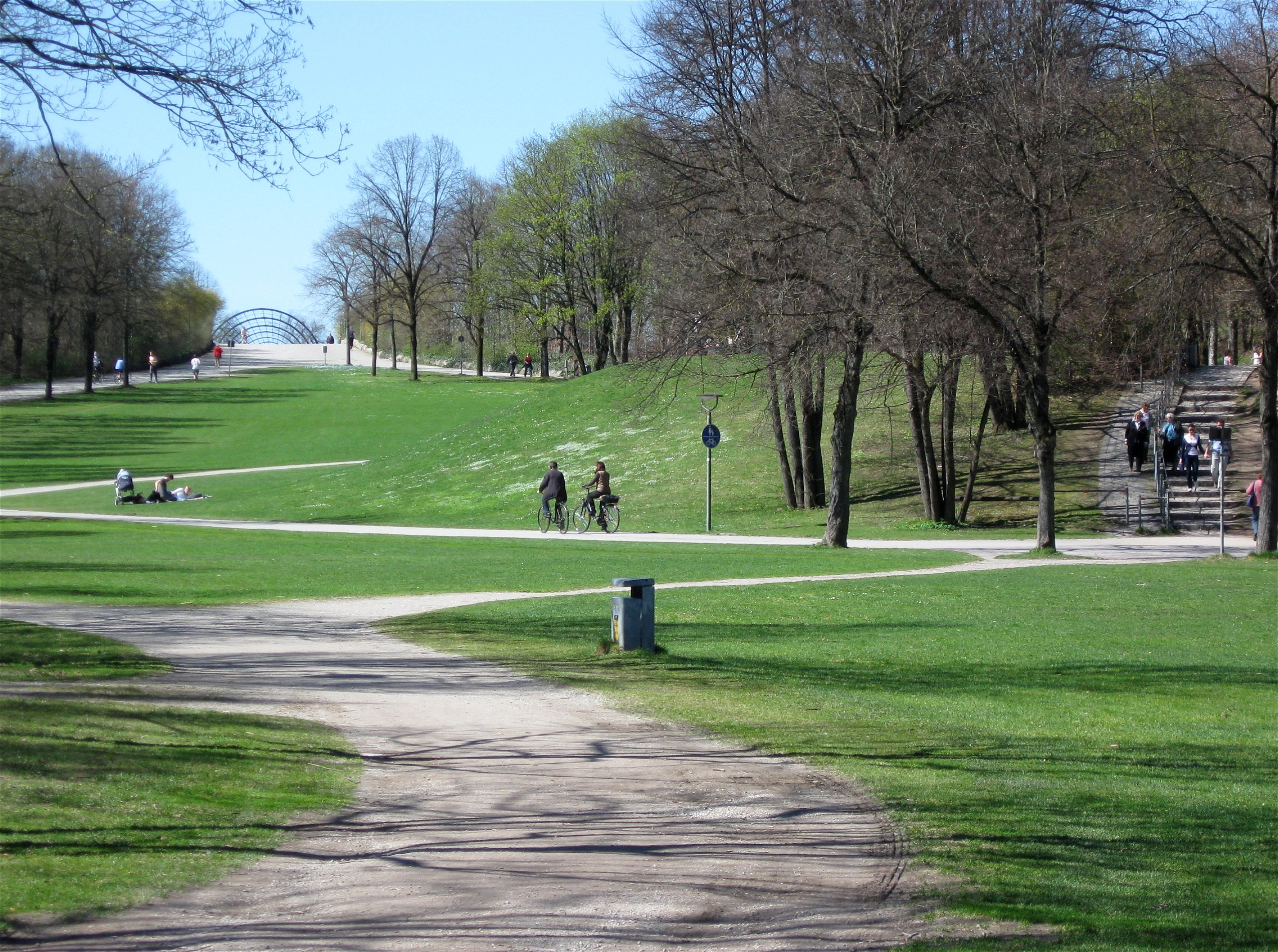 Westpark, München